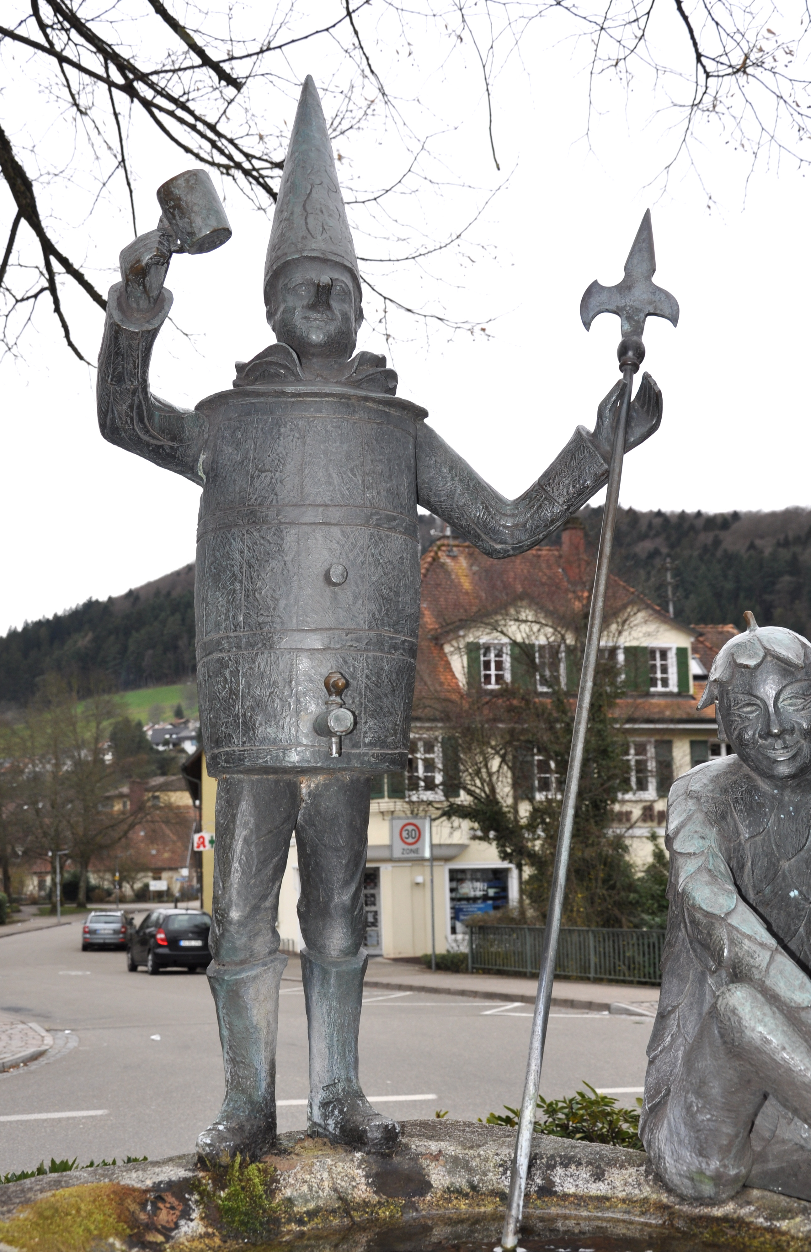 Haslach im Kinzigtal, Narrenbrunnen (von Herbert Maier, 1976) Ranzengardist